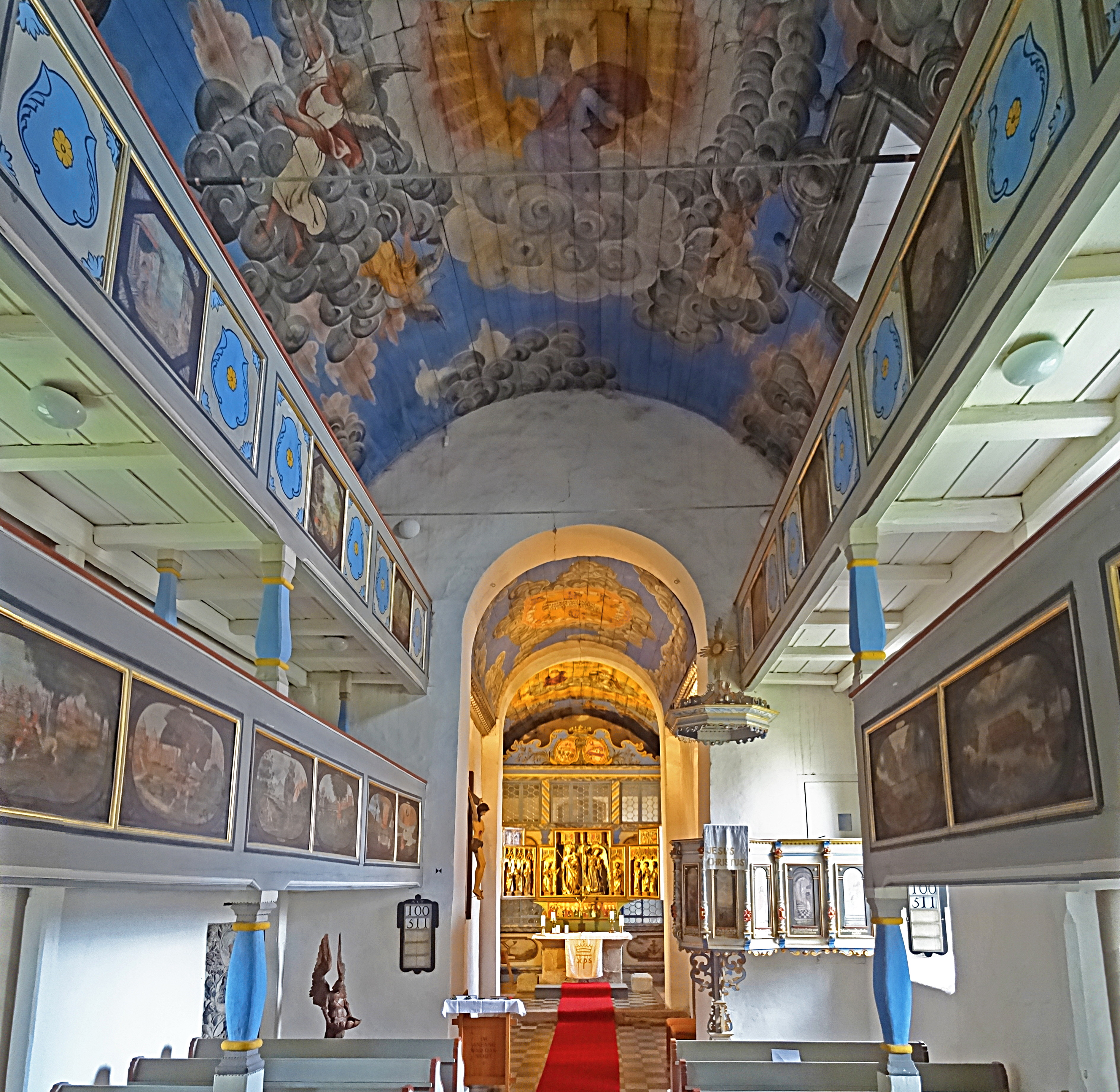 Blick durchs Kirchenschiff zum Chor in der Dorfkirche St. Michael (Großkochberg). Die Deckenmalereien aus dem 18. Jahrhundert zeigen im Chor: die Dreifaltigkeit und Engel mit Spruchbändern, im alten Chorteil: Engel um ein Schild, im Langhaus: Christus gekrönt und mit Sichel in der Rechten sitzt auf Wolken im Strahlenkranz umringt von Engeln mit Spruchbändern.